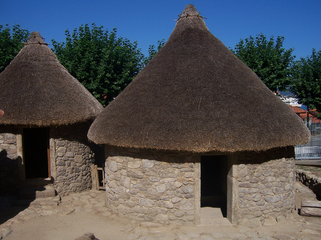 Basándose en la información proporcionada por el yacimiento y por otros castros similares, se han reproducido tres edificios que ilustran un momento inicial de la ocupación romana. Vivienda a la derecha y almacén a la izquierda.